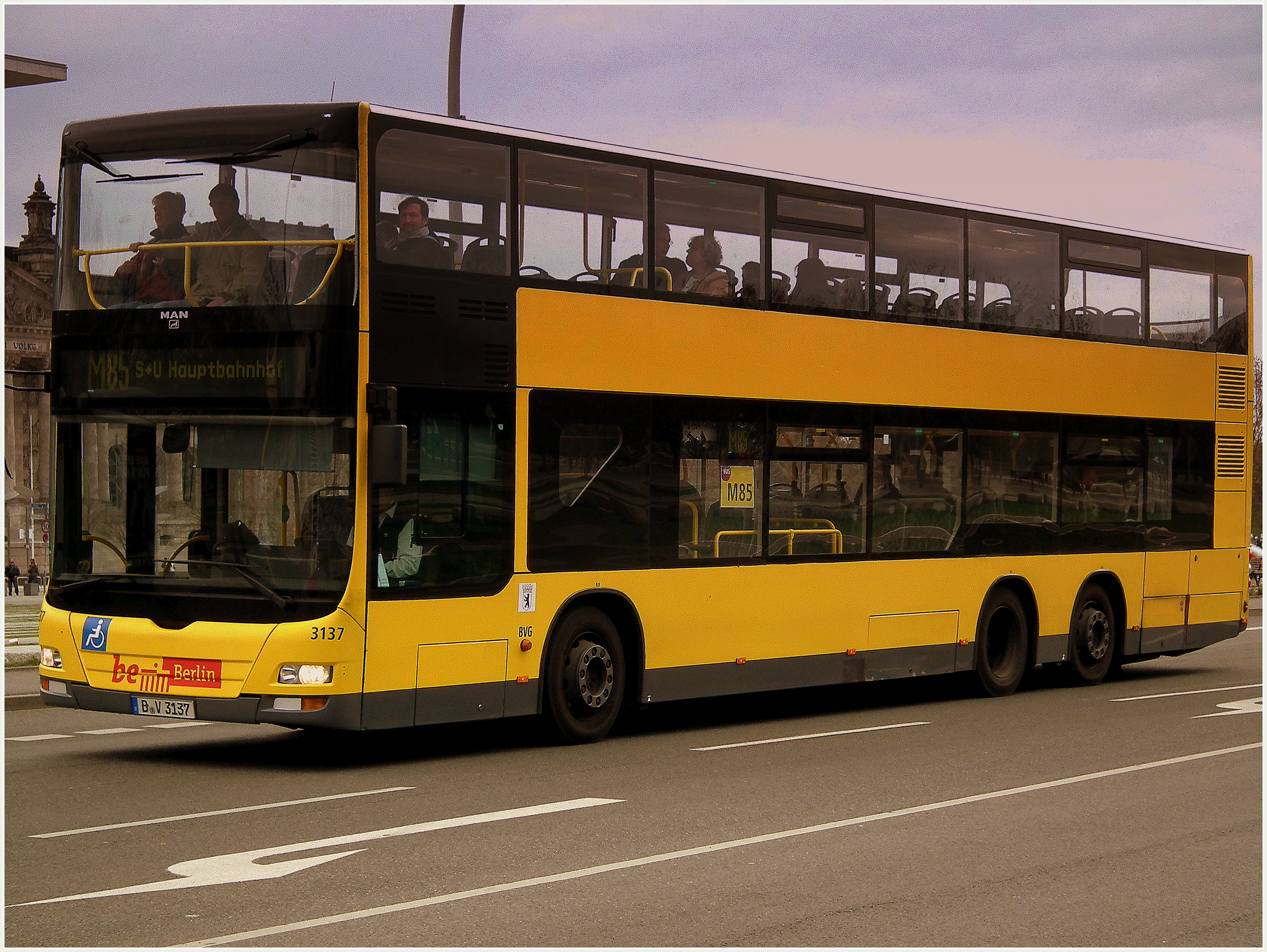 ROUTE M85 BERLIN MAN DOUBLE DECKER BUS NEAR THE BUNDESTAG BERLIN MAN DOUBLE DECK BUS BERLIN GERMANY APRIL 2012